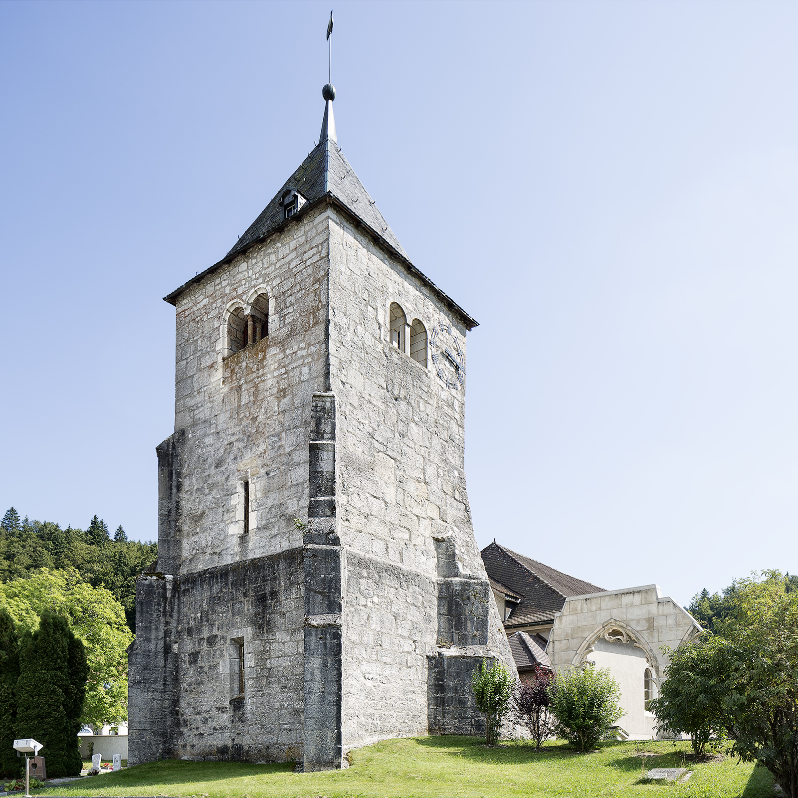 Glockenturm und Kreuzgangsbogen des ehemaligen Klosters